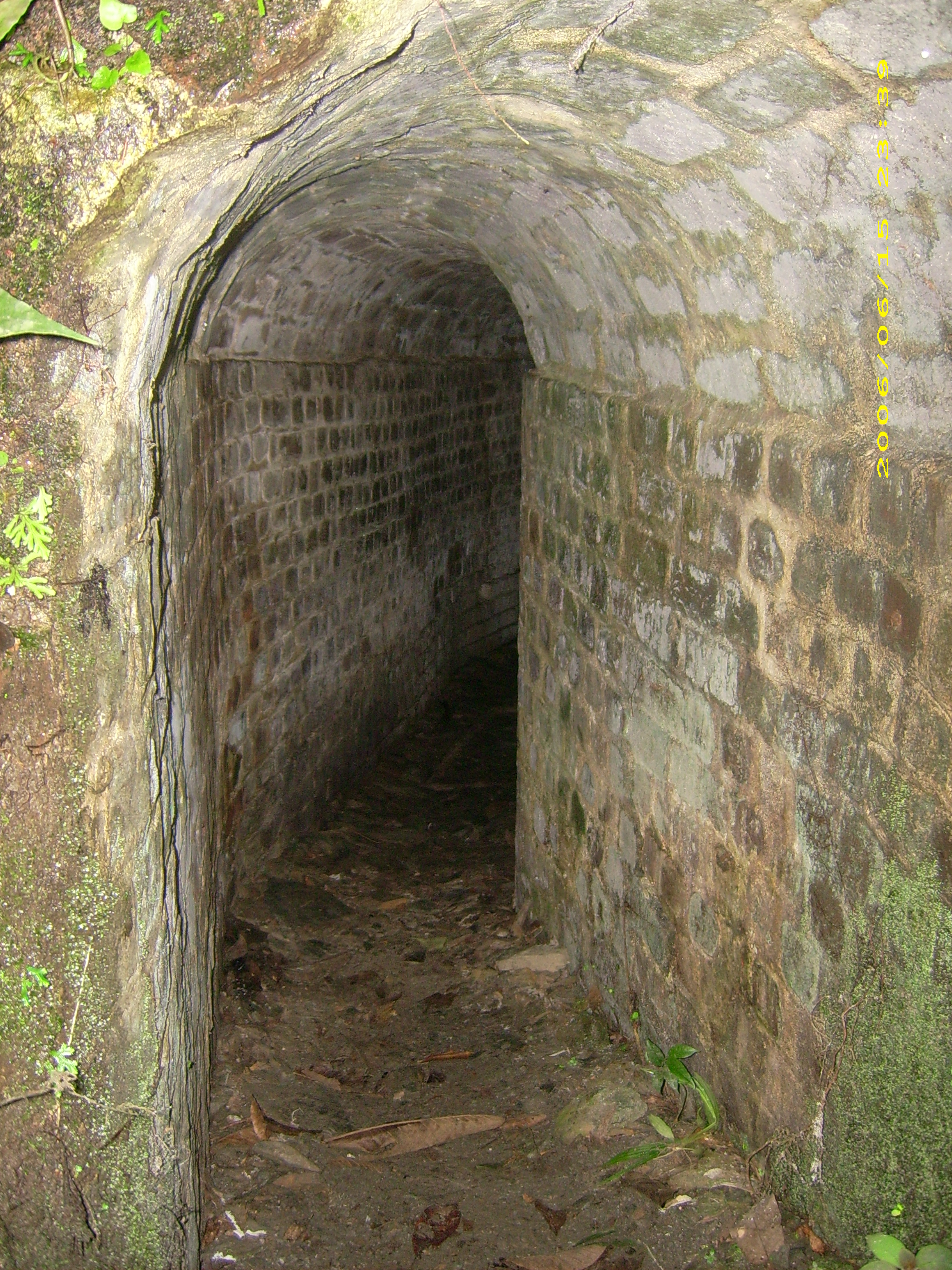 tunel en ladrillo ruinas de Falan